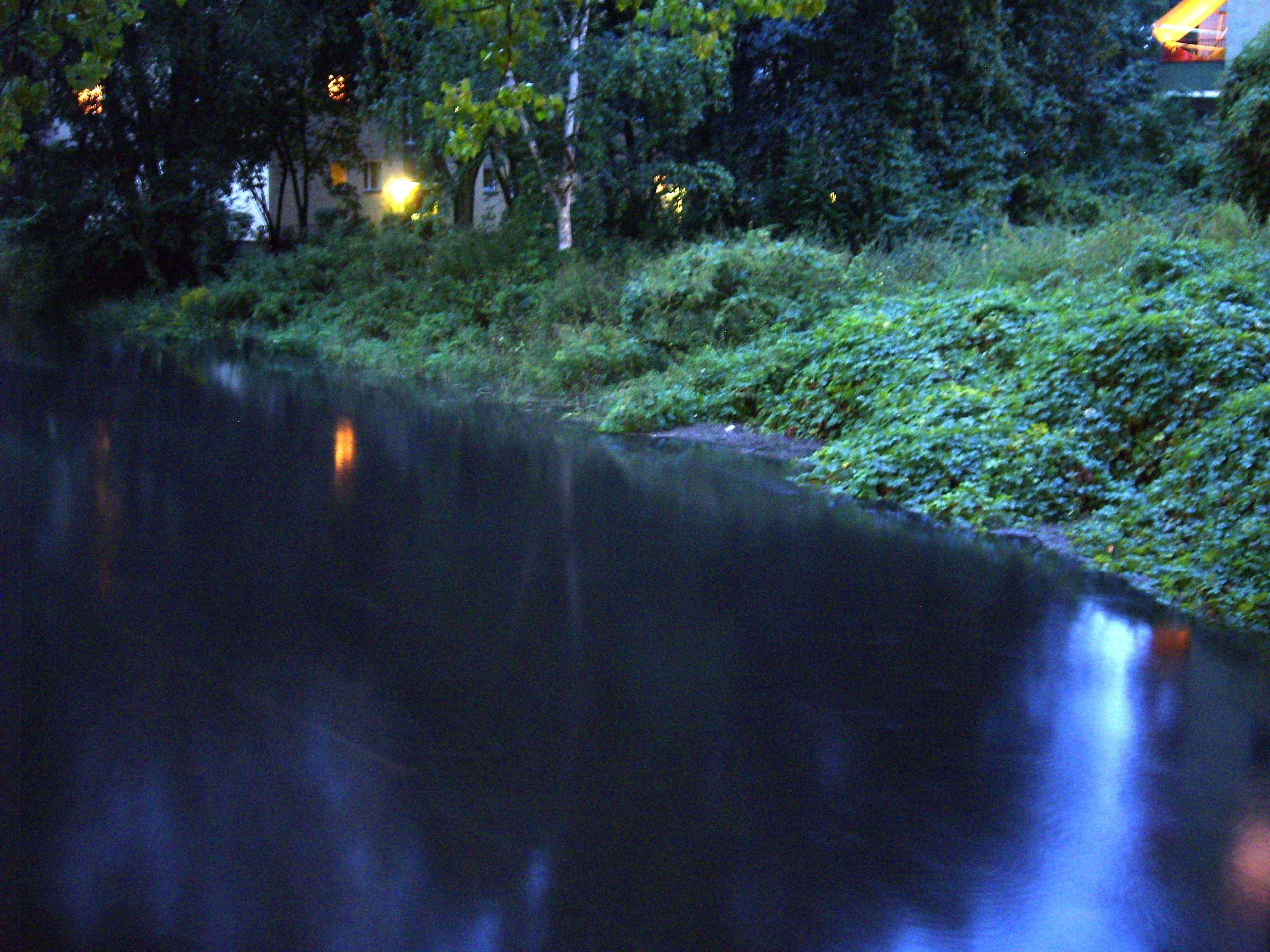 Berlin-Gesundbrunnen, Fluß Panke, Hochwasser 2009